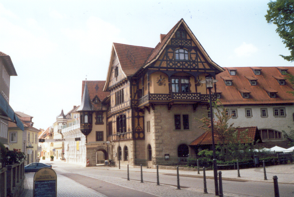 Das Henneberger Haus in der Georgstraße (Meiningen). Fotografiert von: Michael Sander